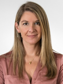 Marcela Constanza Sabat Fernández en la fotografía oficial de diputados periodo 2018-2022. (Fotos: Christel Andler, René Lescornez, Johanna Zárate)